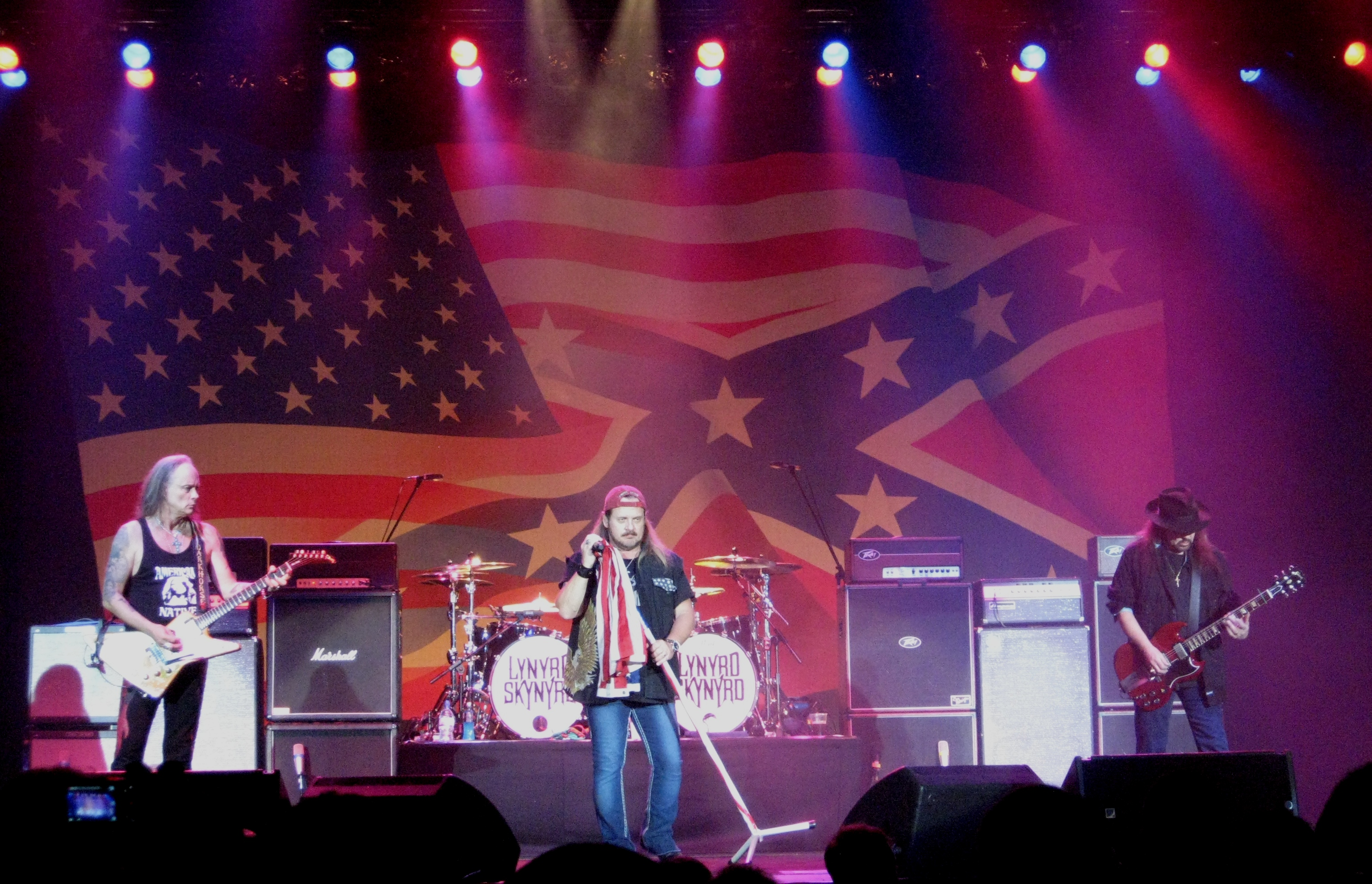 Lynyrd Skynyrd performing live in Cardiff (2010).